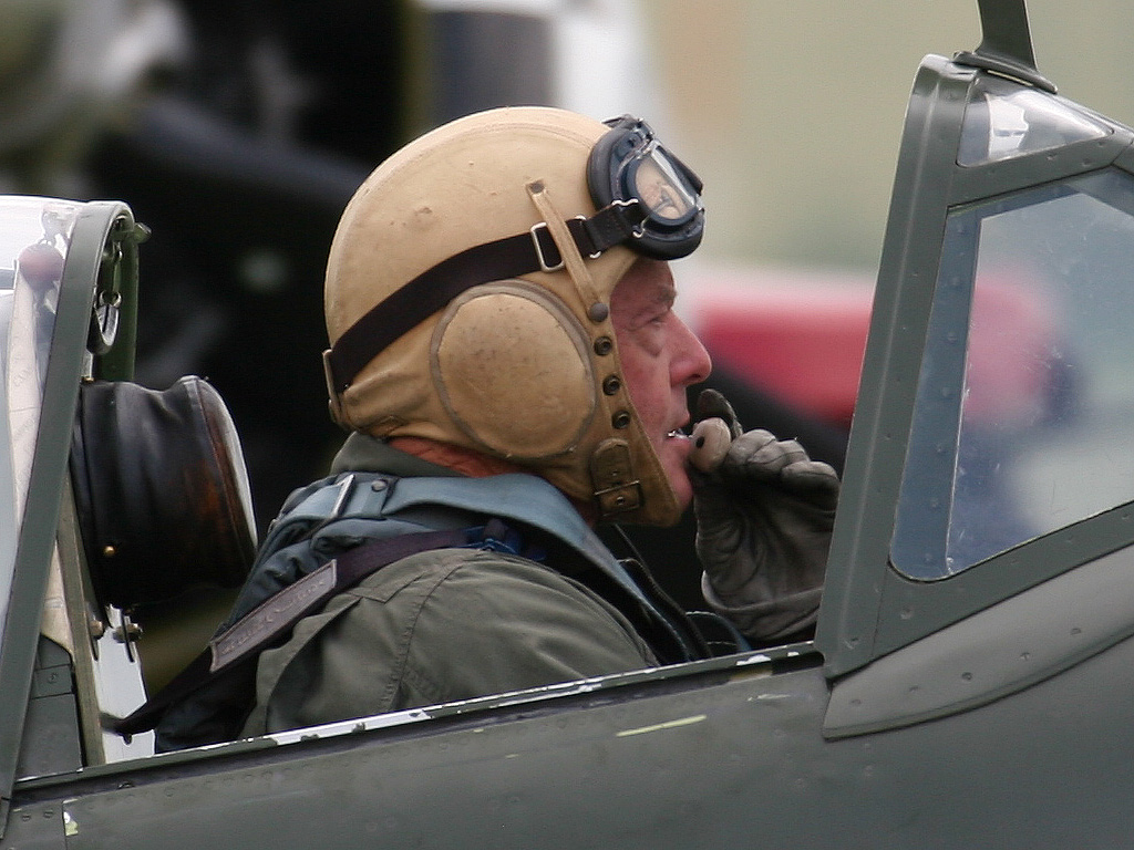 Ray Hanna aux commandes du Spitfire MH434 au décollage lors du Flying Legends de 2005 Auteur : Franck Cabrol Licence : GNU/GFDL Permissions transmise à le 09/10/2006